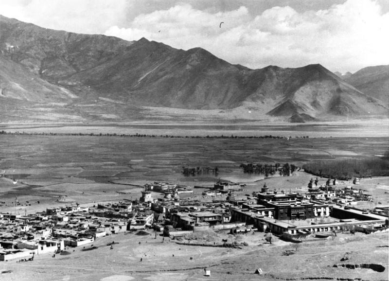 Tsetang, Ortschaft mit Kloster